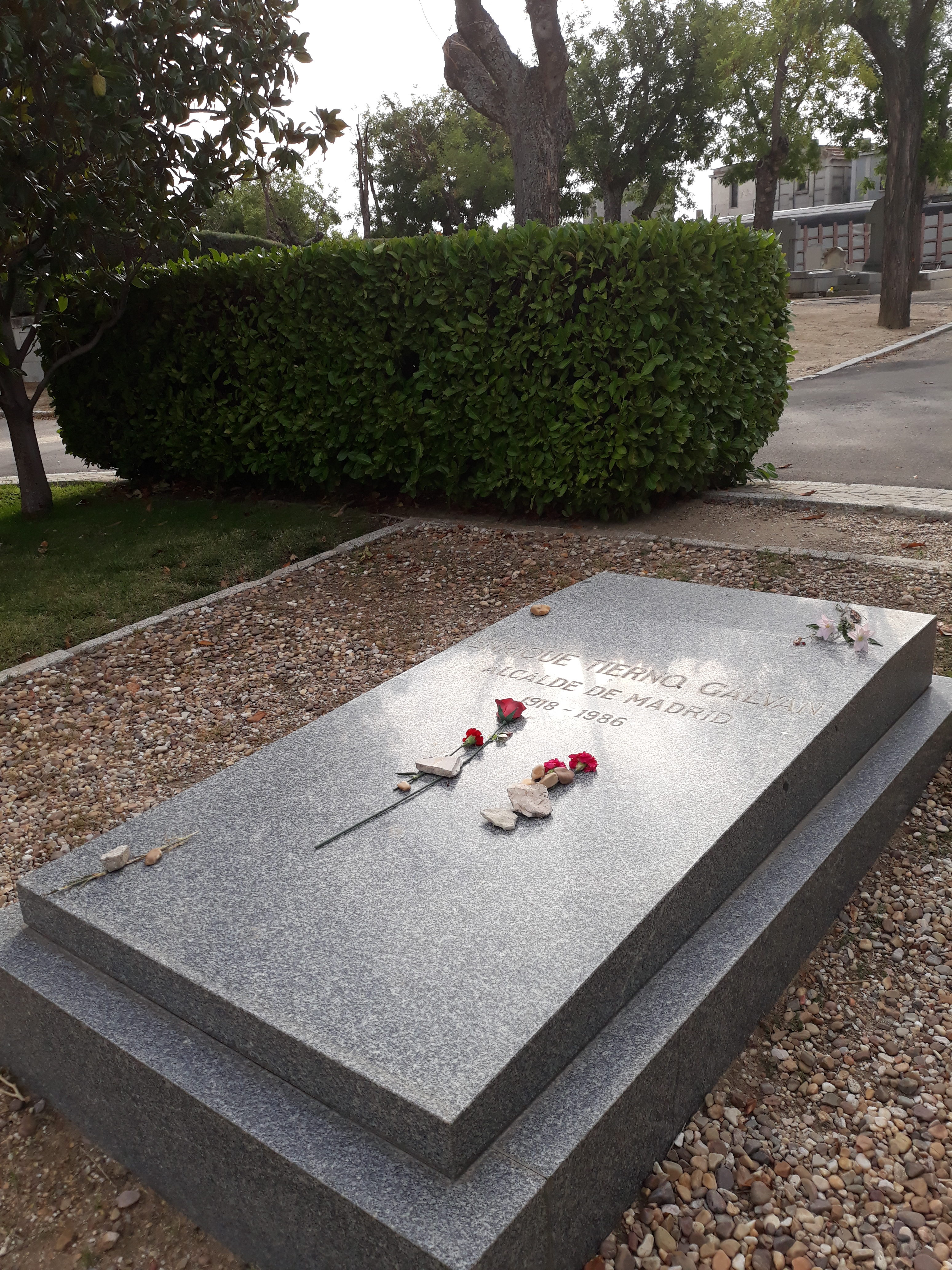 Das Grab des spanischen Politikers Enrique Tierno Galván auf dem Almudena-Friedhof in Madrid (Spanien).